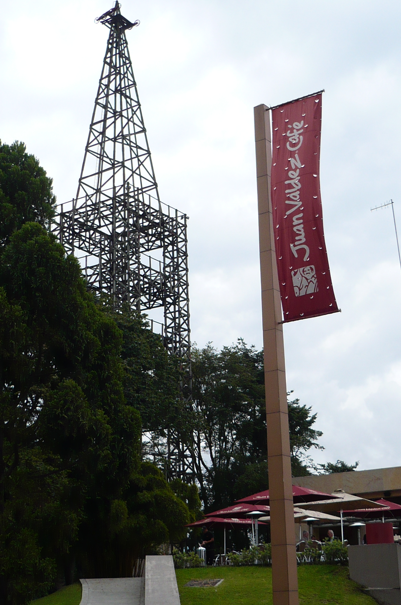 Torre del Cable en Manizales, junto con el café Juan Valdez